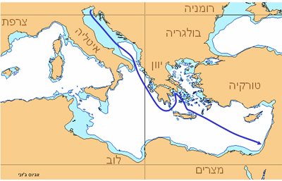 אגיוס ג'יוני - מסלול